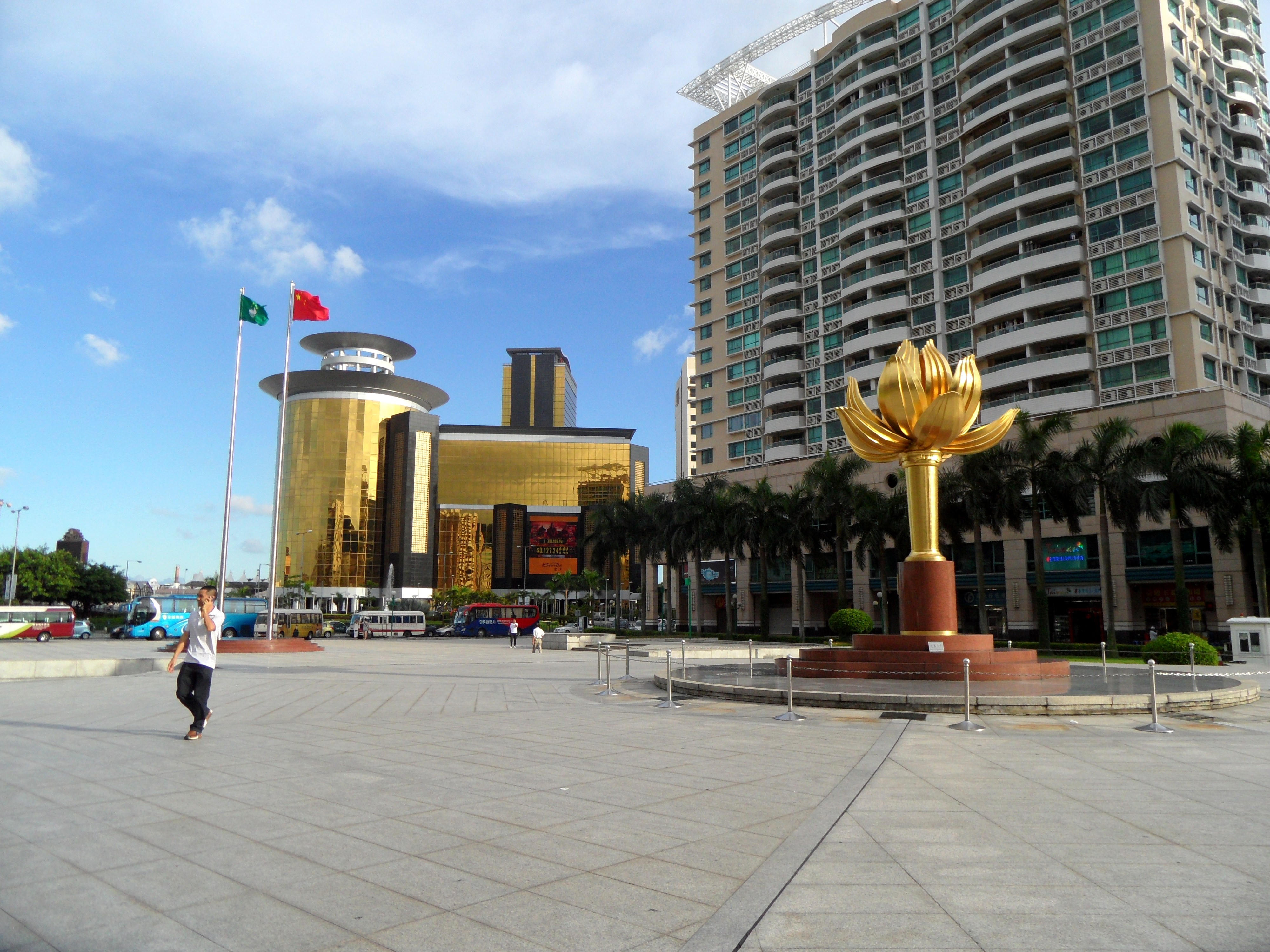 澳门街道景色